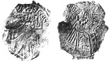 Сребреник